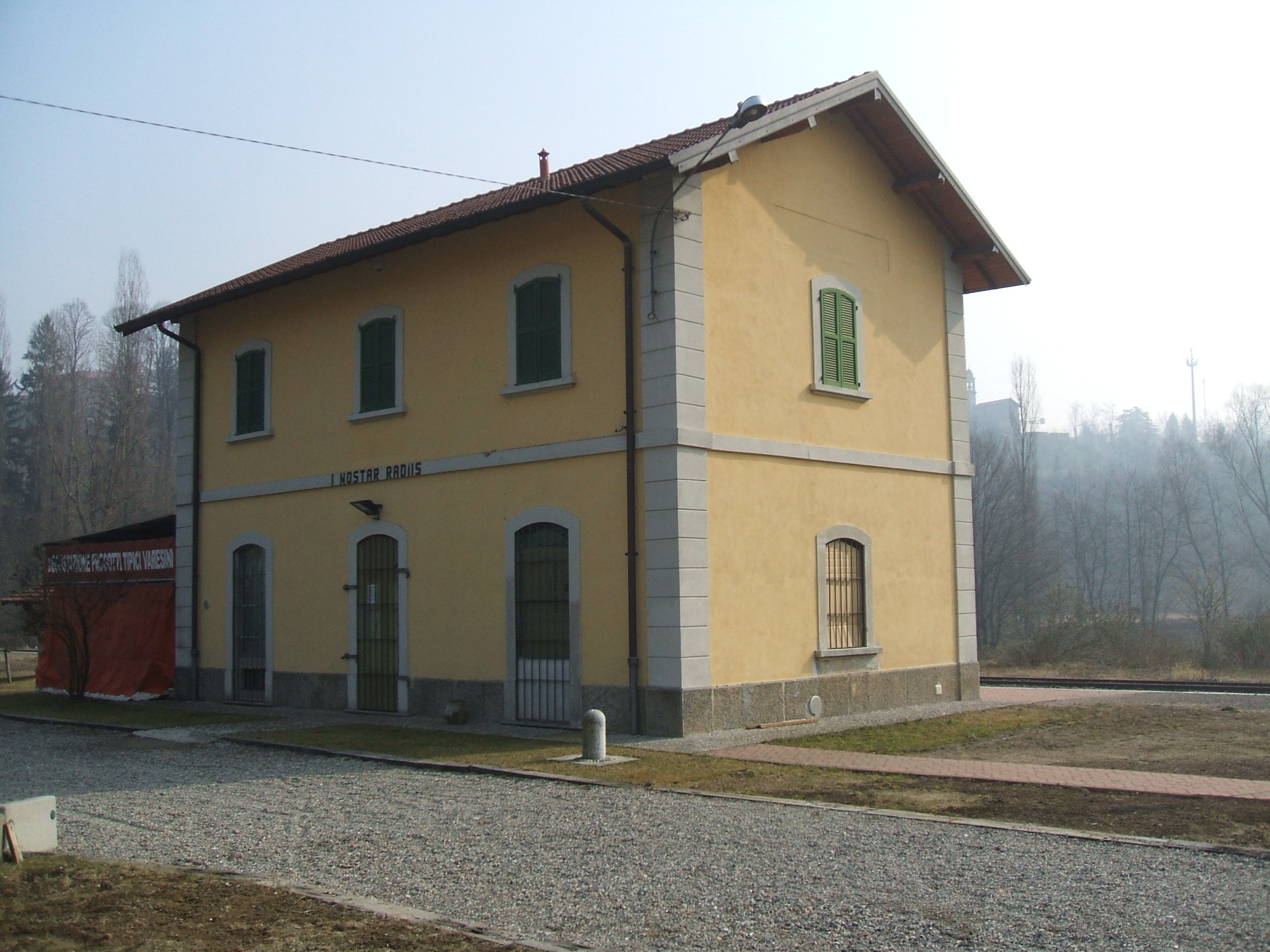 Stazione Malnate Olona-Linea della Valmorea